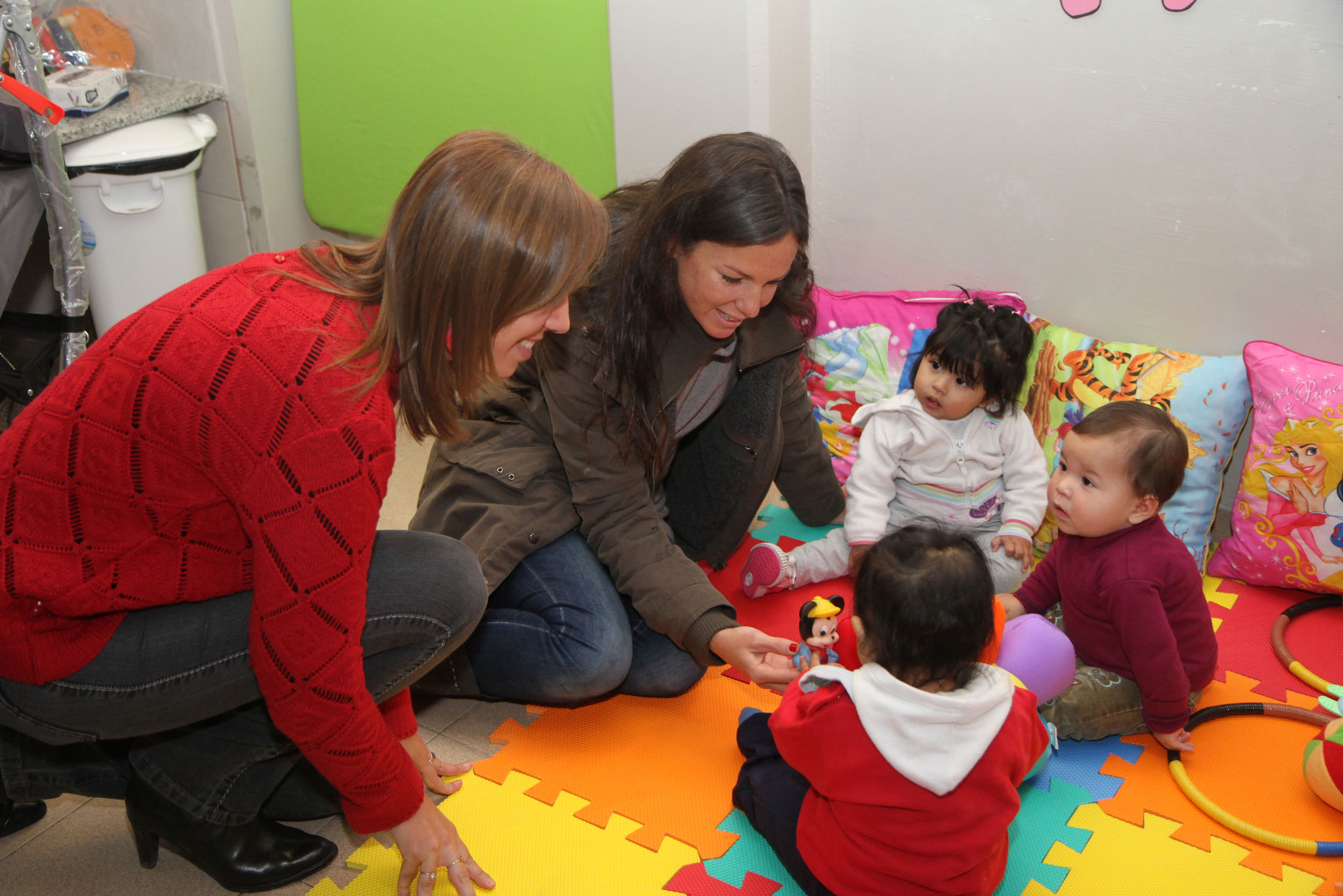 Buenos Aires, Abril 27 de 2012 - La vicejefe de Gobierno porteño, María Eugenia Vidal; el jefe de Gabinete, Horacio Rodríguez Larreta, y la ministra de Desarrollo Social, Carolina Stanley presentaron hoy el Centro de Primera Infancia (CPI) “Tiempo de Compartir”, ubicado en el barrio de Villa Soldati que brinda cuidado a 72 niños y niñas en situación de vulnerabilidad social. Fotos:Maria Ines Ghiglione/GCBA